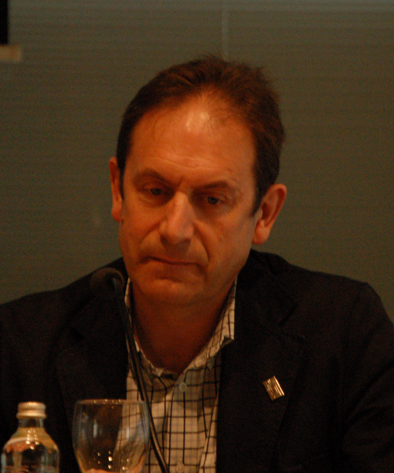 Antonio Reigosa no Congreso Pontes de cultura, pontes de futuro, organizado pola asociación Ponte... nas ondas!, celebrado no Verbum - Casa das palabras de Vigo